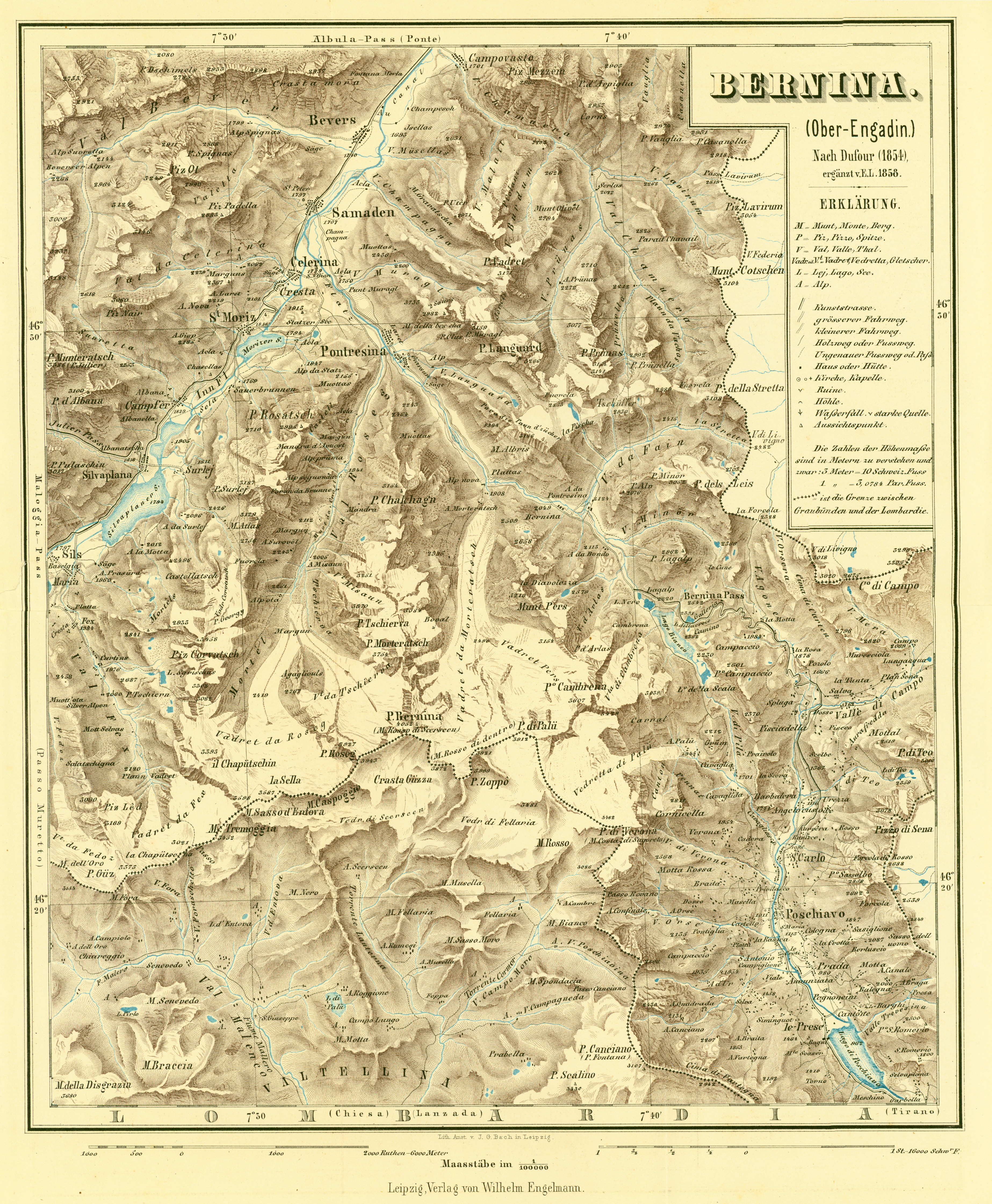 Karte des Oberengadins, Ernst Lechner nach der Dufour-Karte, 1858. Kartenbeilage zu Piz Languard und die Bernina-Gruppe bei Pontresina Rumantsch: Charta geografica da l'Engiadin'Ota, Ernst Lechner tenor la charta da Dufour, 1858. Supplement al cudesch Piz Languard und die Bernina-Gruppe bei Pontresina